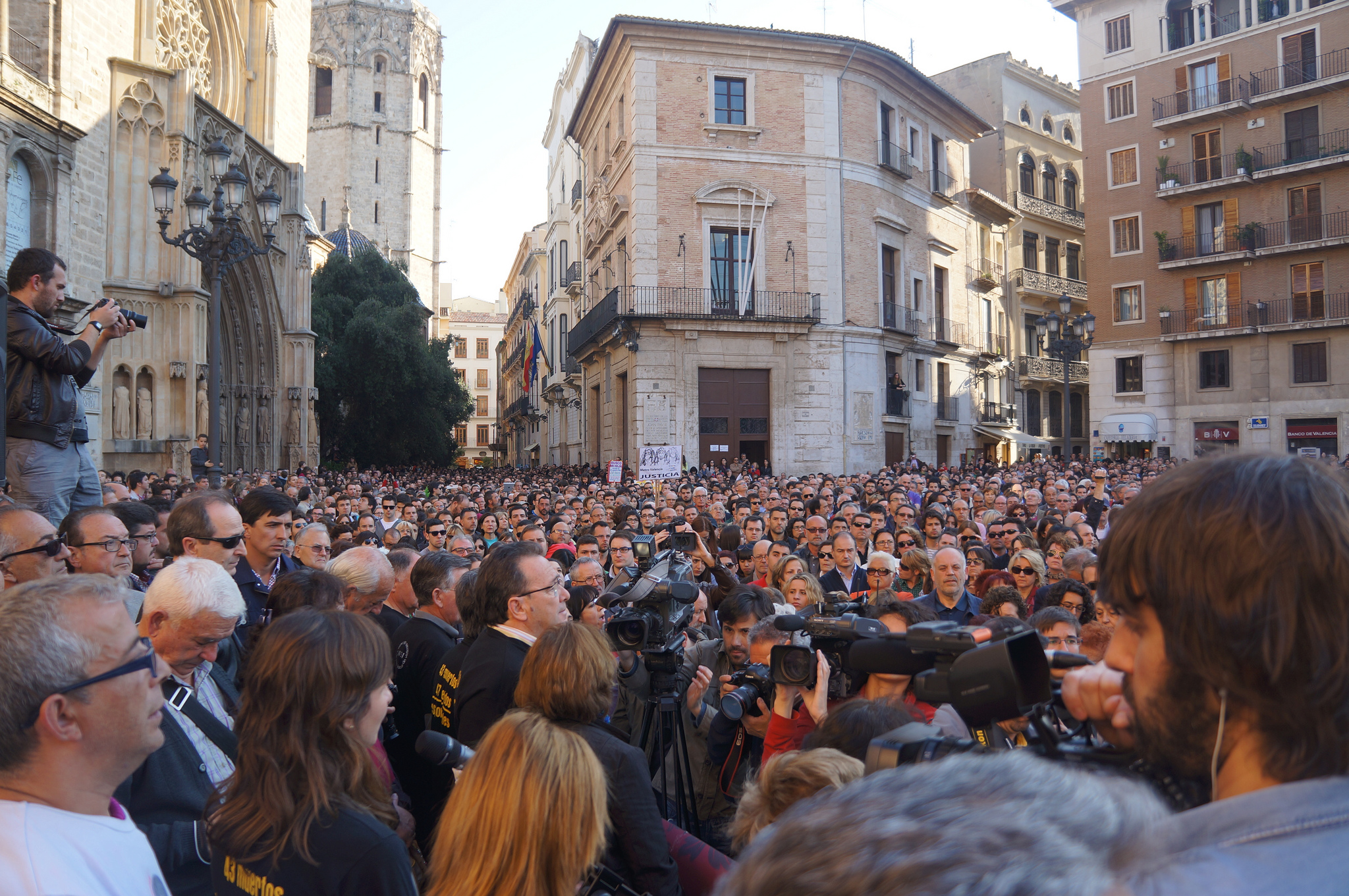 Concentración víctimas accidente metro Valencia